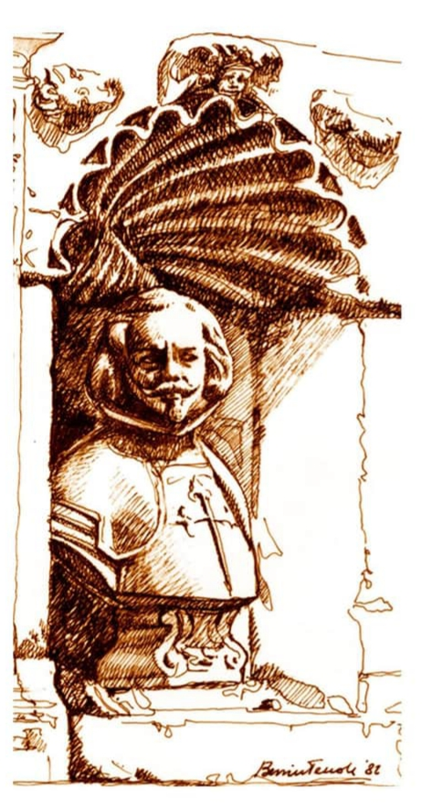 Disegno del mezzobusto del principe Nicolò Placido Branciforti realizzato del leonfortese Claudio Benintende nel 1982